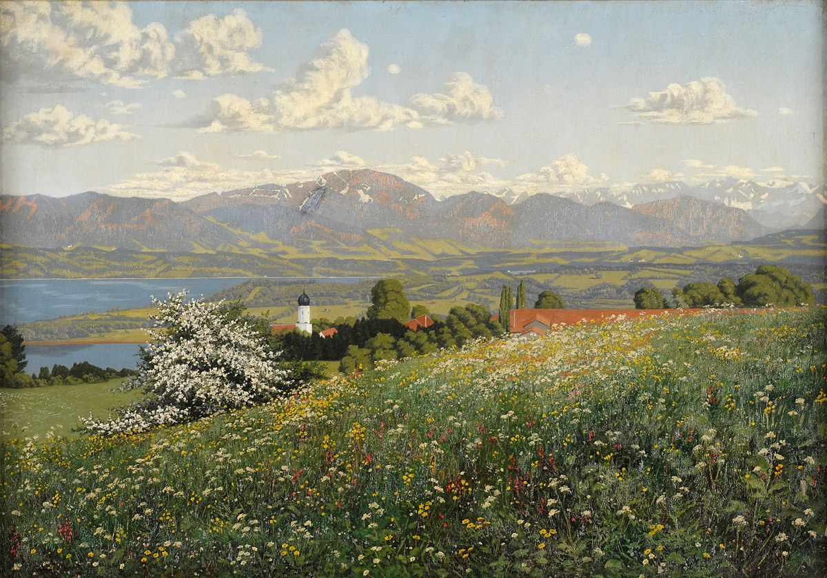 Blühende Chiemseelandschaft, signiert,Öl auf Leinwand, 70 x 100 cm